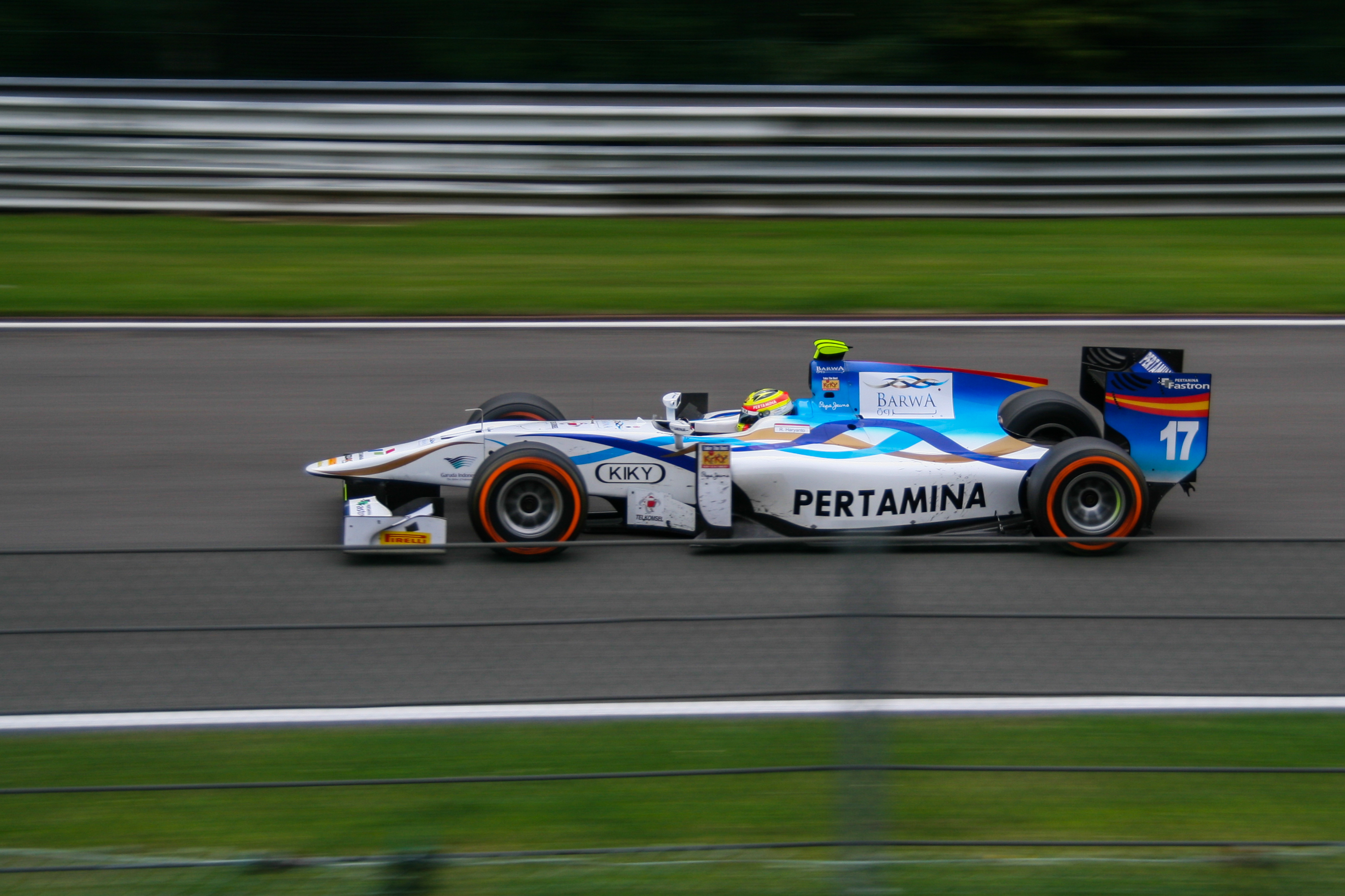 Rio Haryanto beim Hauptrennen der GP2-Serie in Spa-Francorchamps 2013